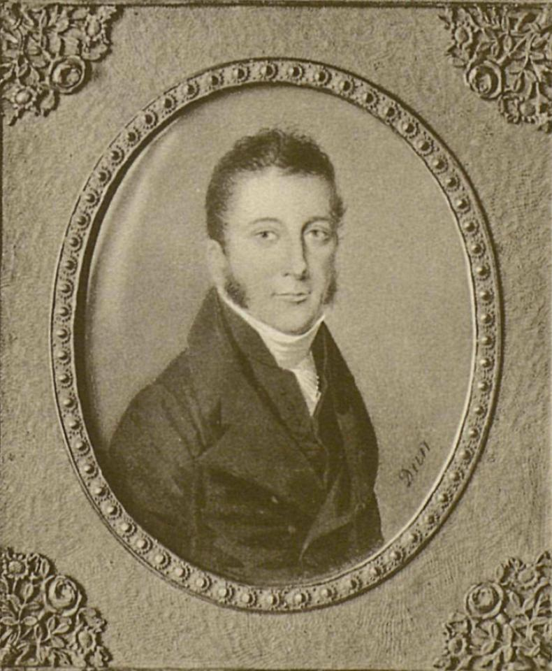 Граф Григорий Владимирович Орлов (1777—1826), камер-юнкер, сенатор. Был женат с 1800 года на фрейлине графине Анне Ивановне Салтыковой (1777—1824).